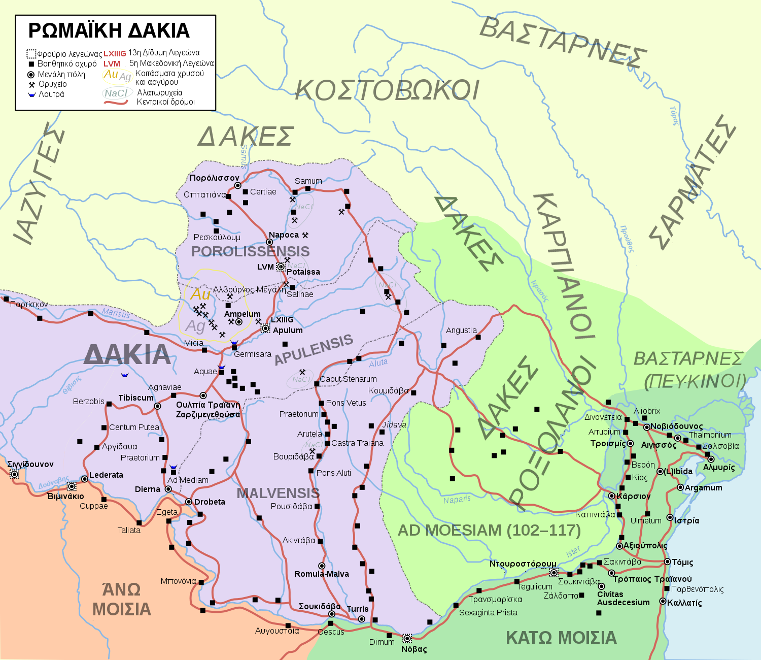 Χάρτης της Ρωμαϊκής Δακίας (106-271 μ.Χ.)